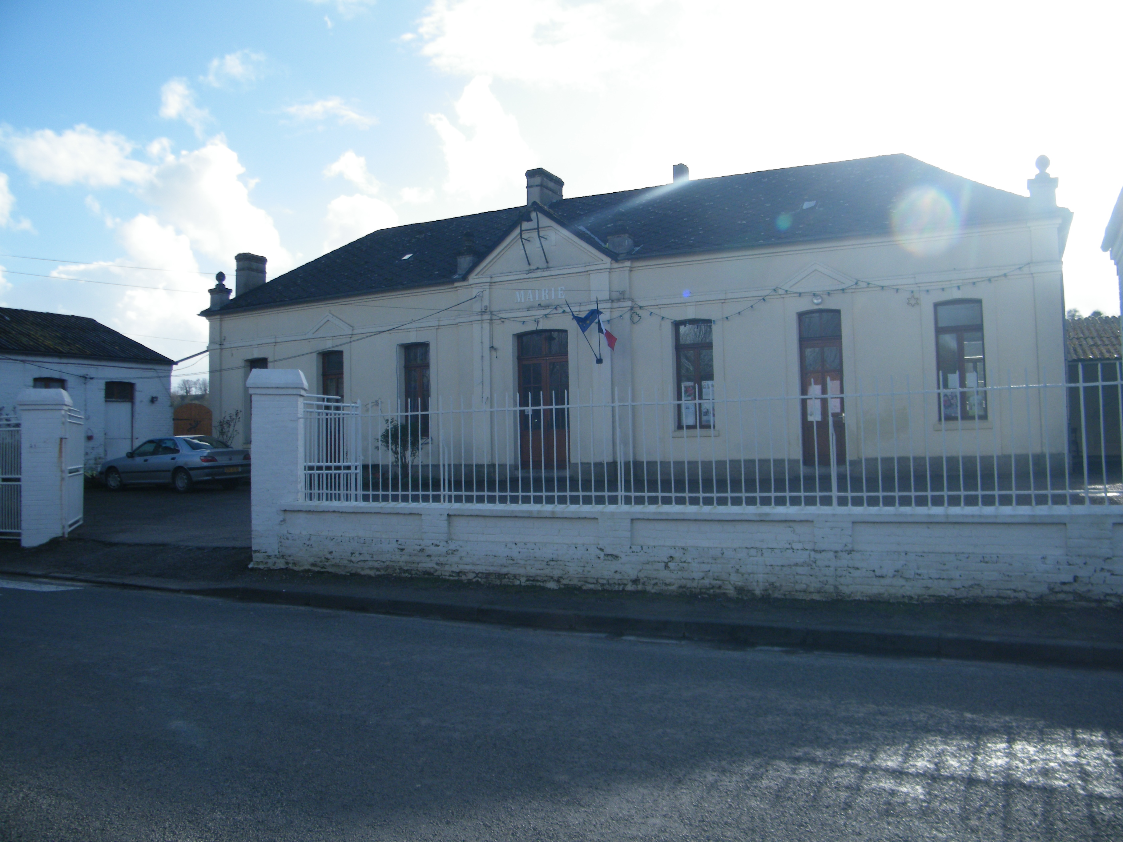 La mairie.